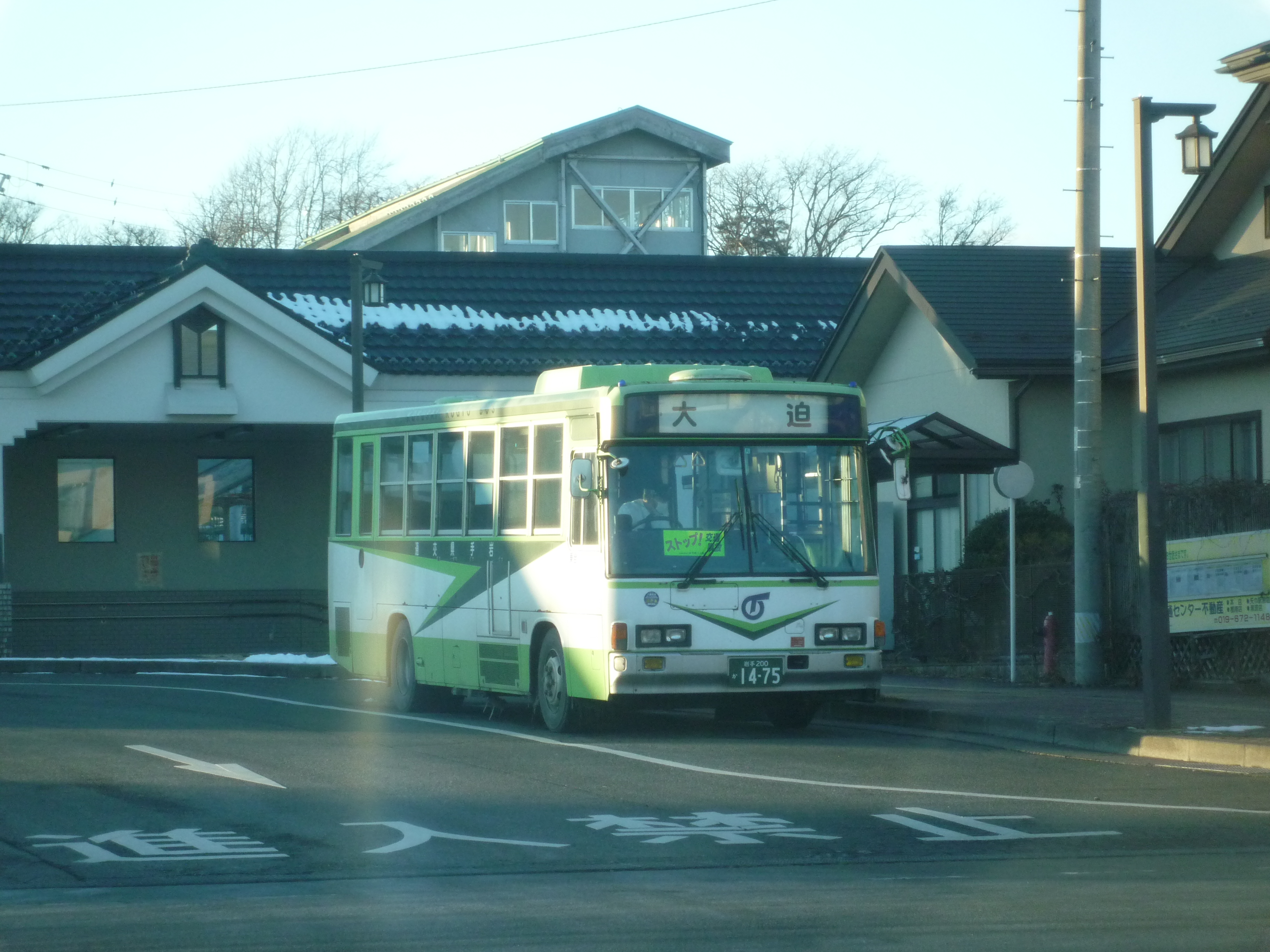 石鳥谷駅で撮影。大迫バスターミナルに向けて発車を待っている。